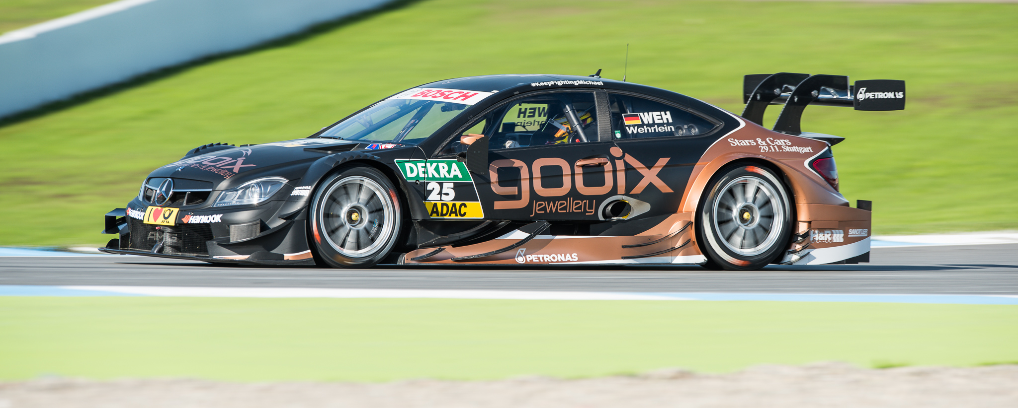 DTM,Deutsche Tourenwagen Masters,HWA AG,Hockenheimring,Motorsport,Pascal Wehrlein,gooix Mercedes AMG C-Coupe